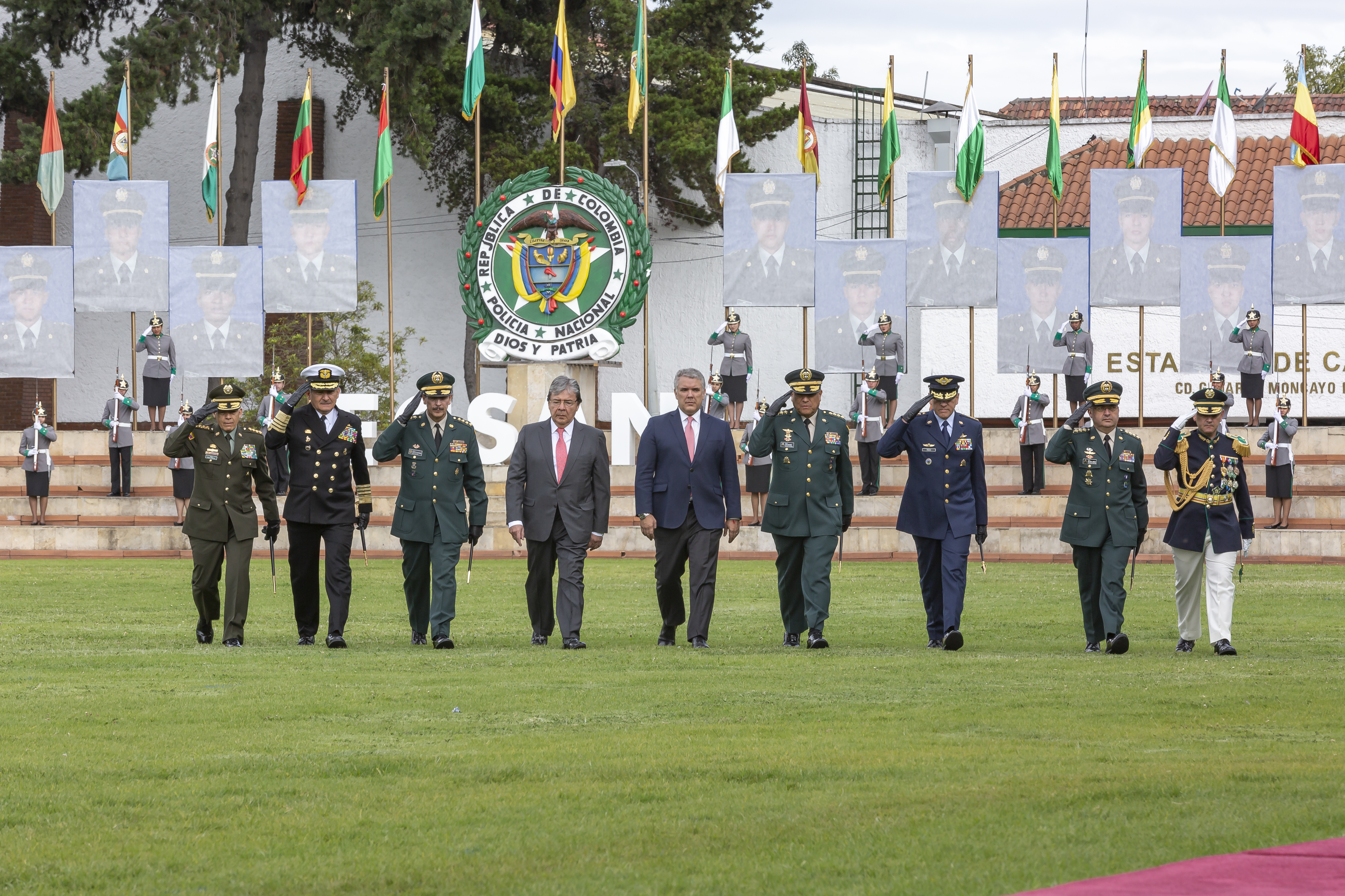 Presidente Iván Duque Márquez junto al Ministro de Defensa Nacional y el Estado Mayor Conjunto en ceremonia de ascensos a oficiales en diciembre de 2019